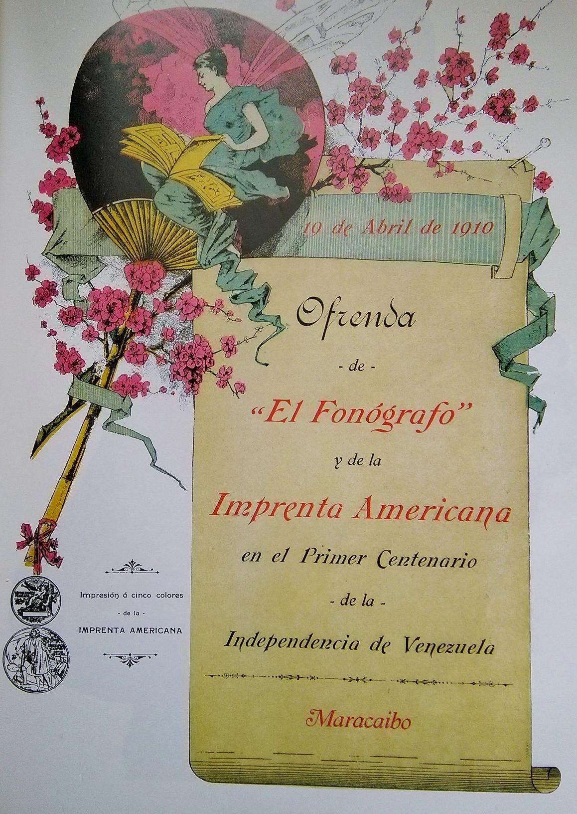 Primera página de la edición especial del diario "El Fonógrafo" de Maracaibo, del 19 de abril de 1910